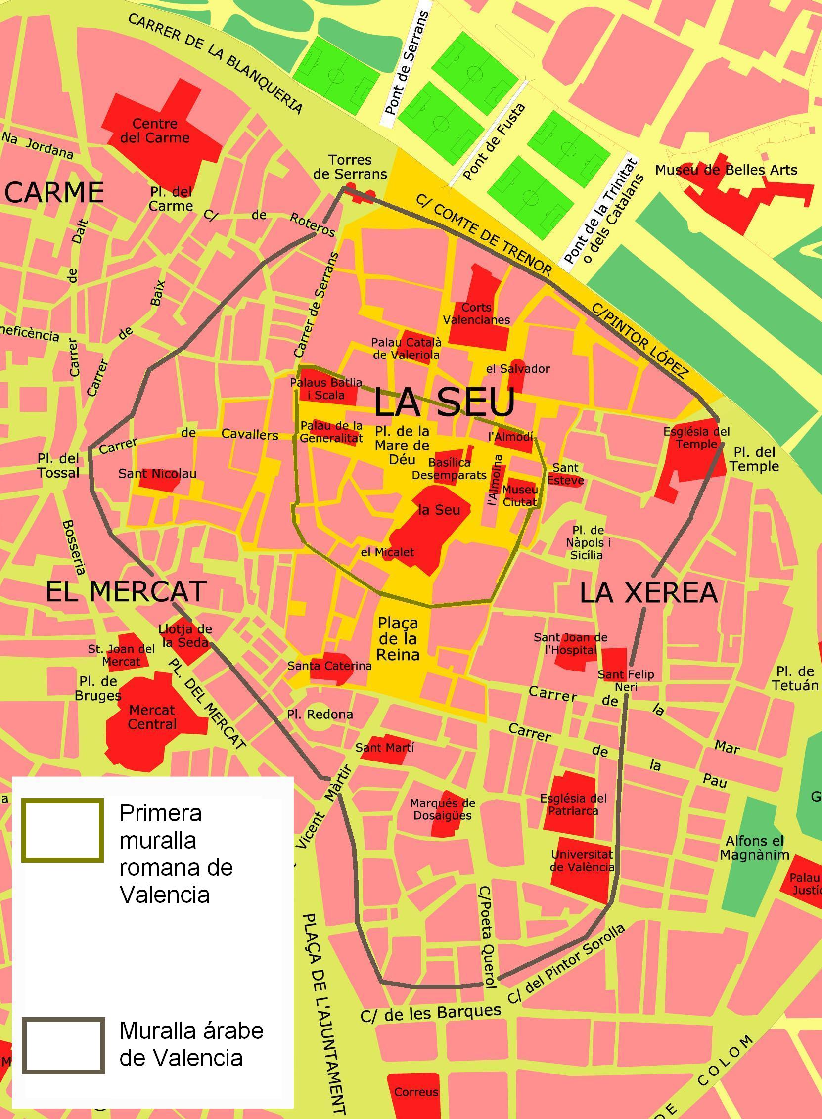 Localización aproximada de las murallas de la ciudad romana (en alguna de sus etapas), y de las murallas de la ciudad árabe, usando el mapa de File:Muralla àrab València.jpg